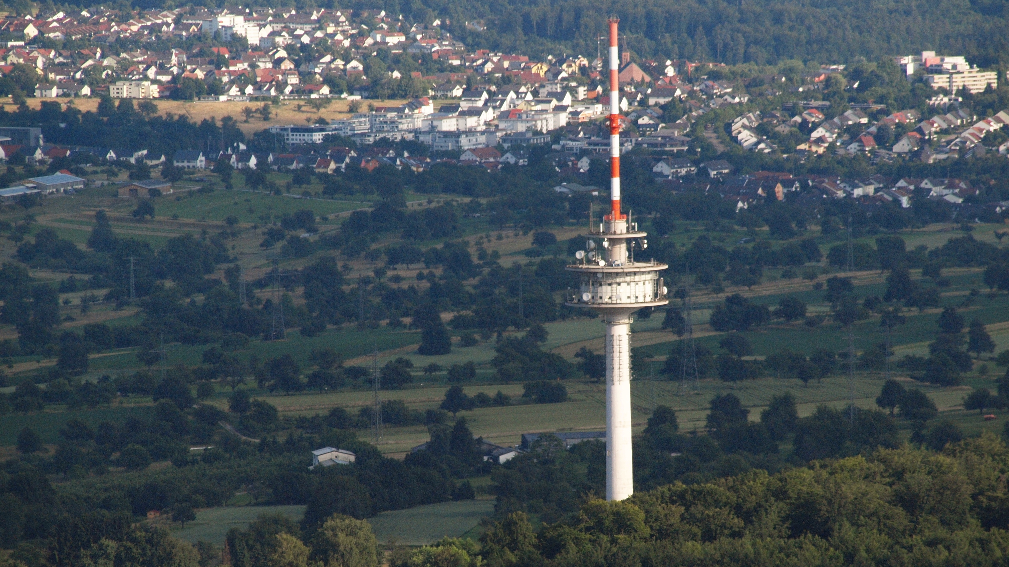 Fernmeldeturm Grünwettersbach, Karlsruhe. Im Hintergrund Waldbronn-Busenbach.